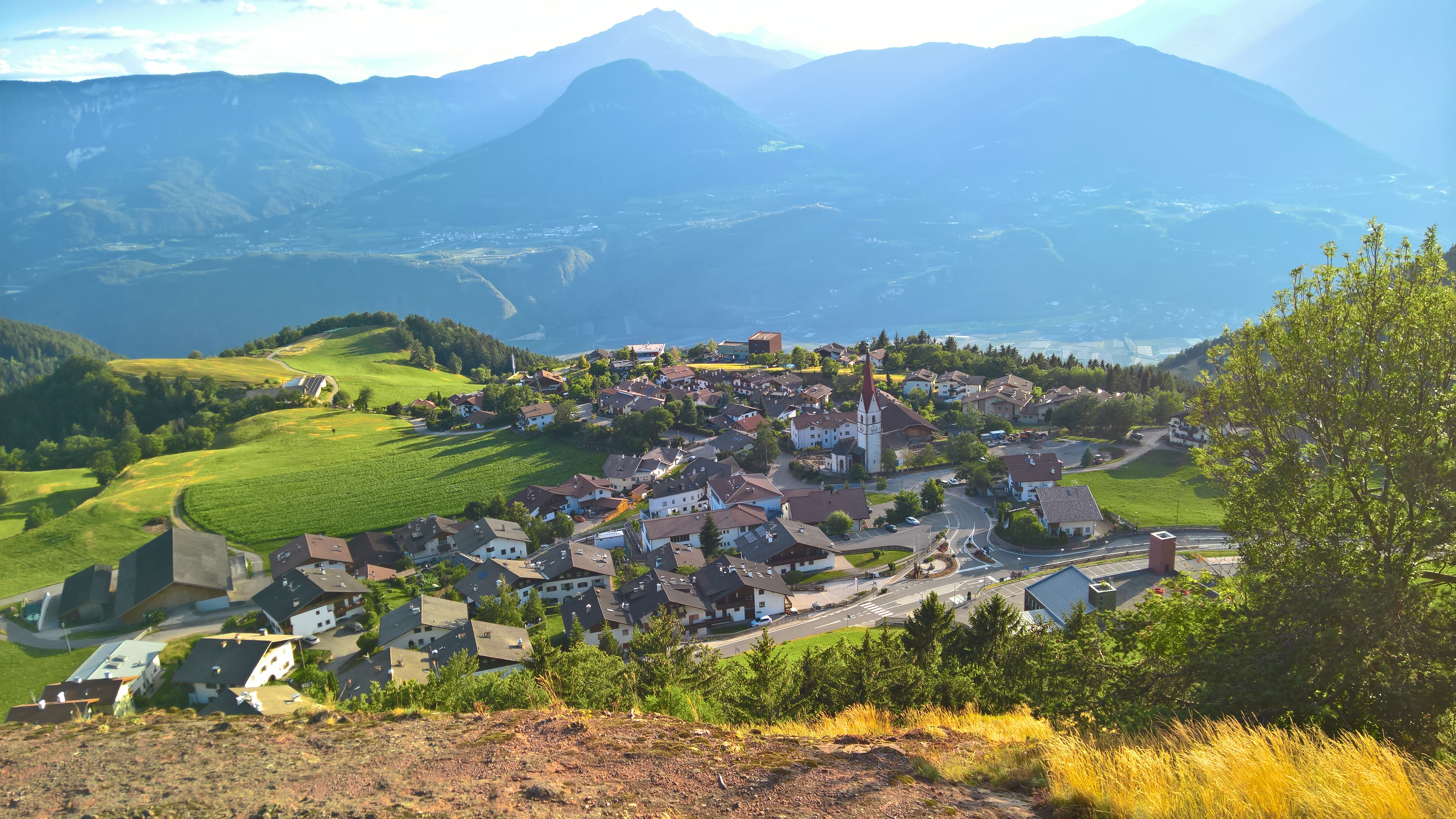 Blick vom Naturdenkmal "Beimsteinknott" auf Vöran und Etschtal